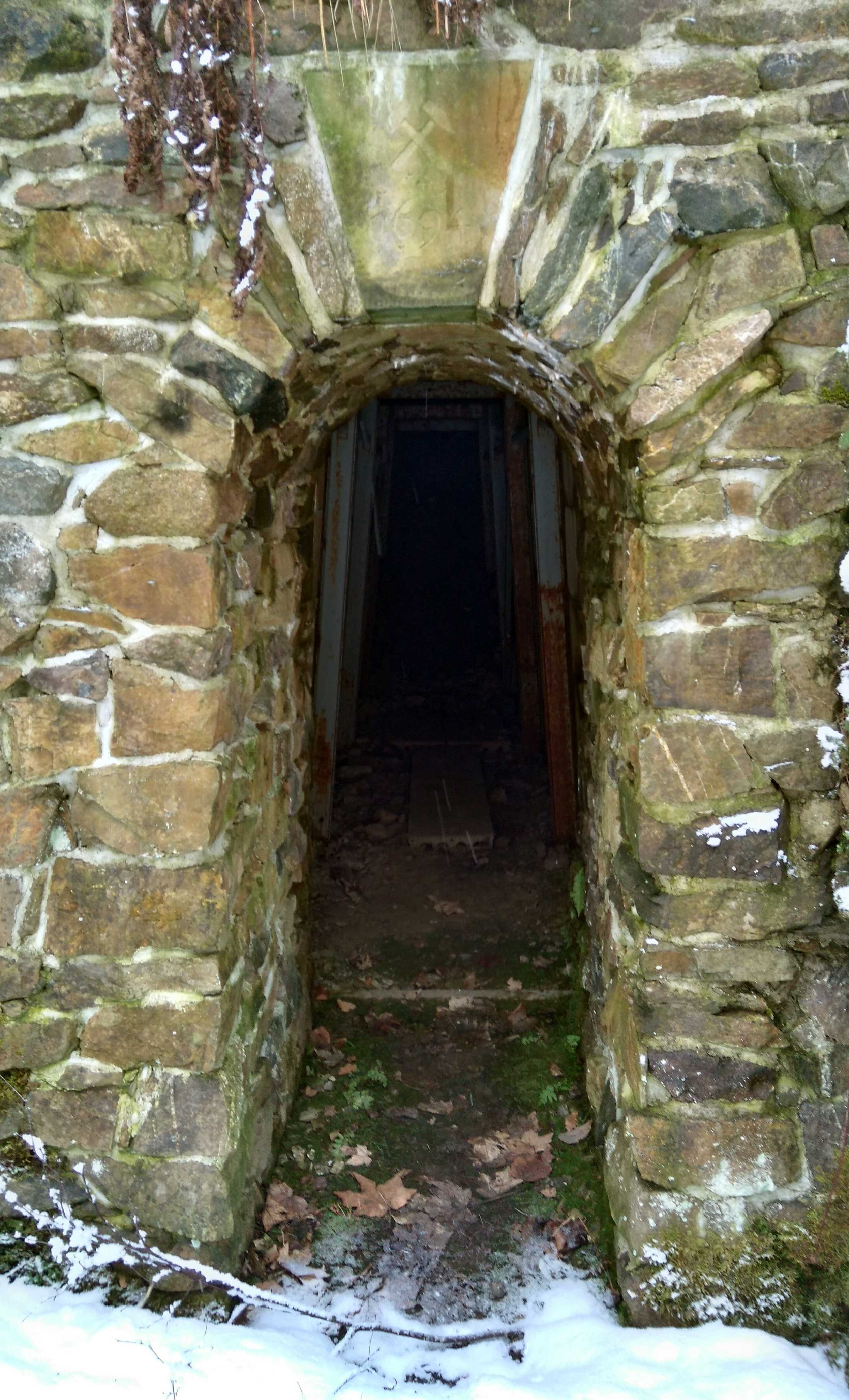 Mundloch des Hartengrippenhagensbergerstollens bei Elbingerode (Harz)